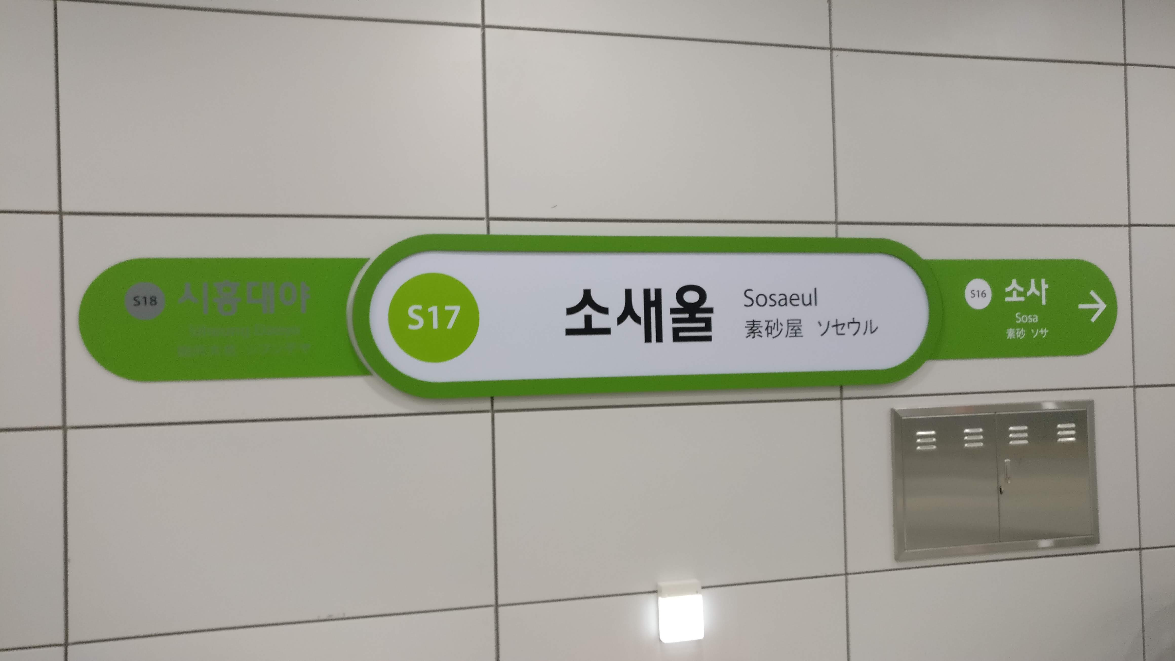 서해선 소새울역 역명판(소사역 방향)